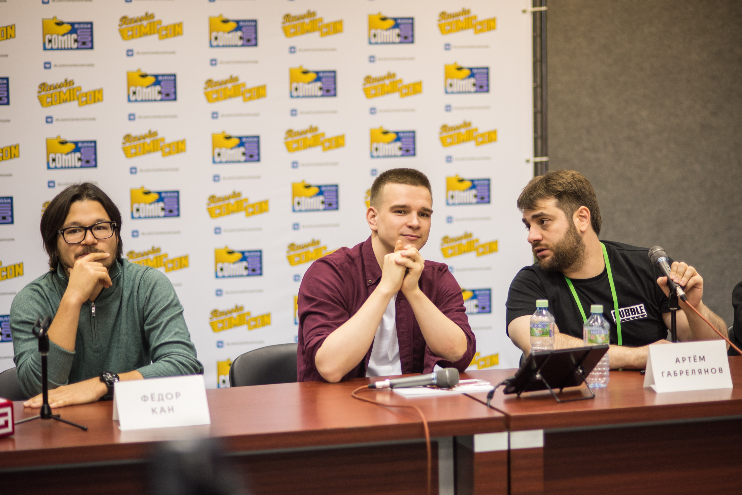 Фёдор Кан, Владимир Беседин и Артём Габрелянов. Презентация фильма «Майор Гром. Чумной Доктор»